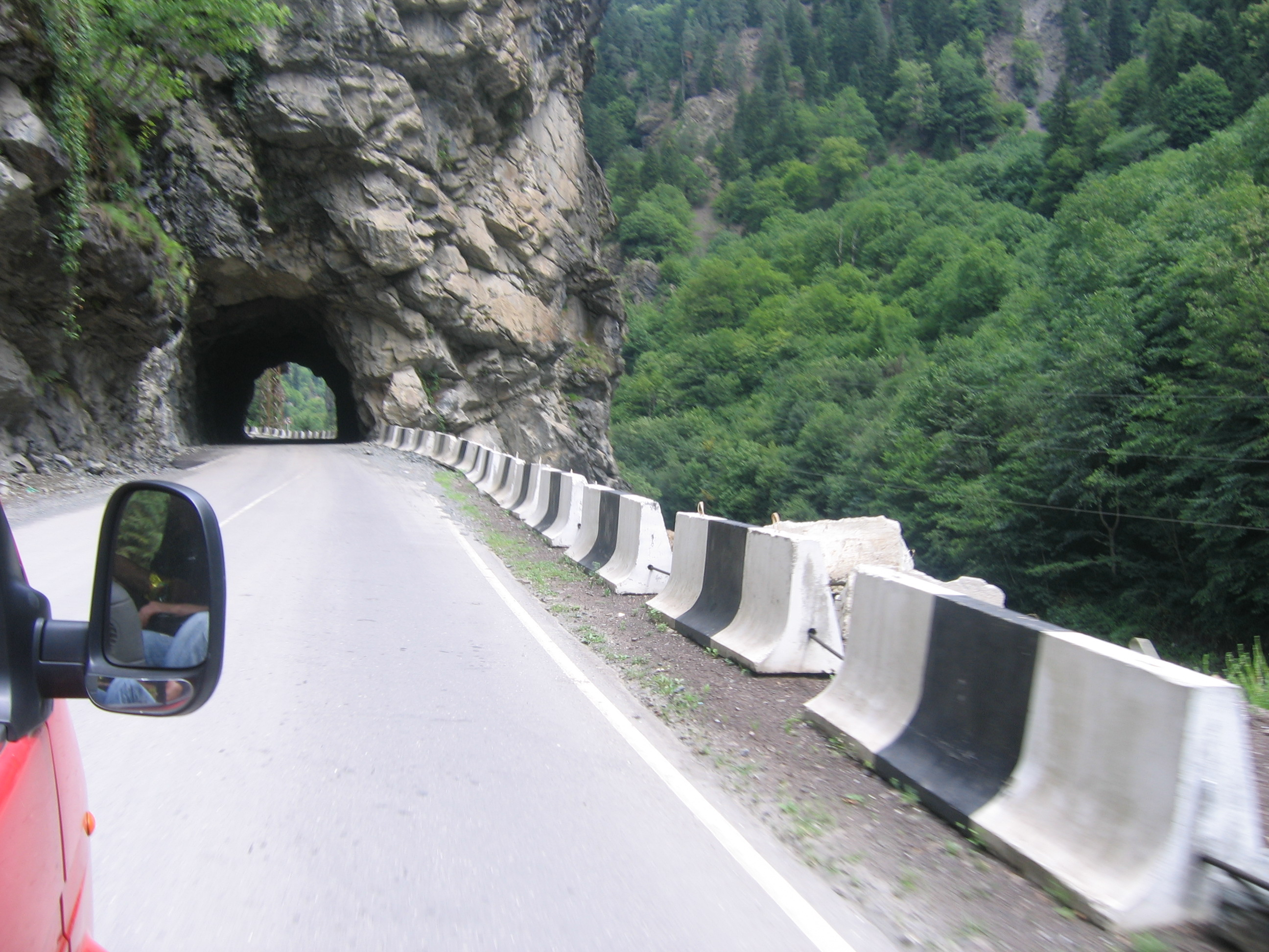 Road in Svaneti, Georgia